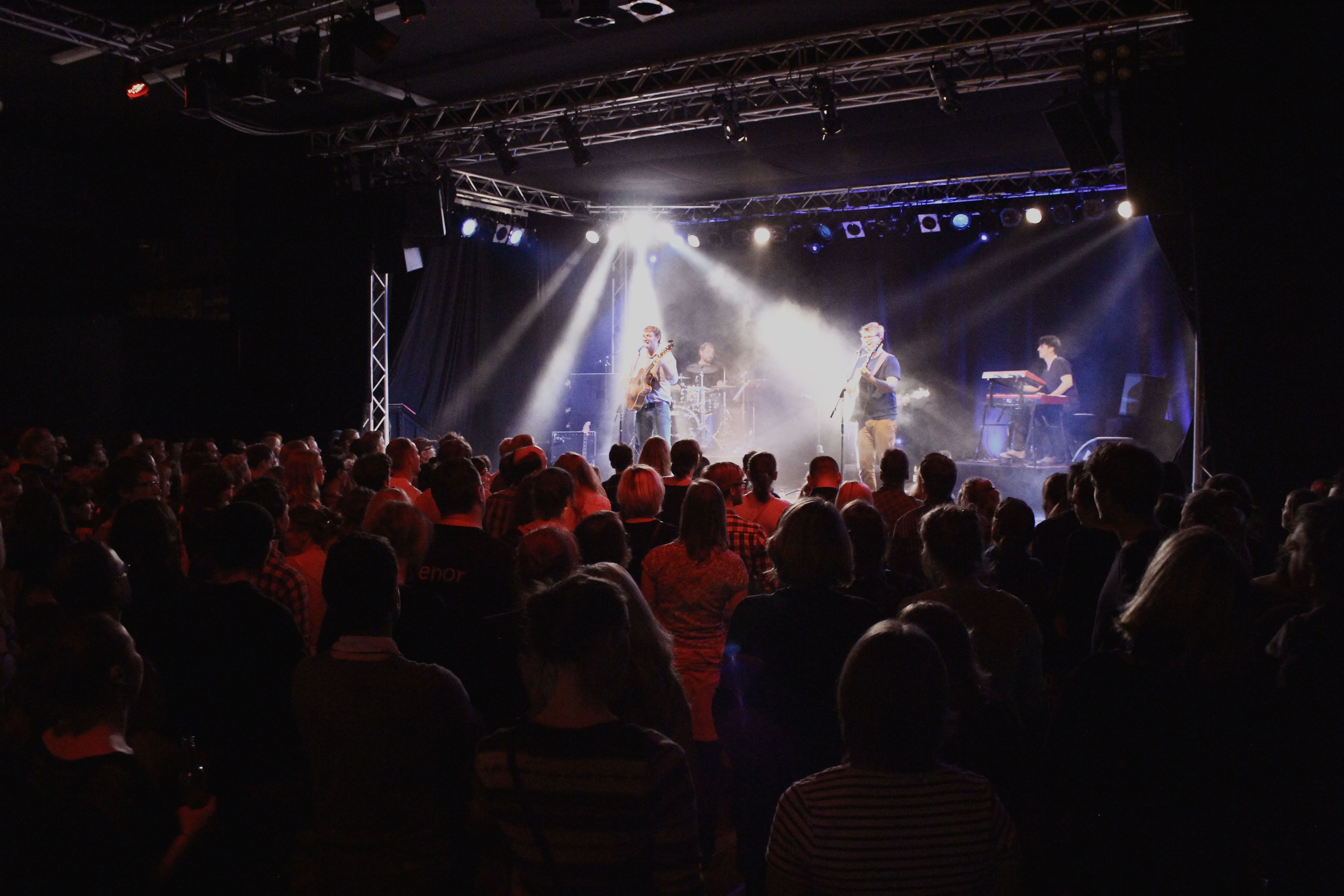 byebye mit fünfköpfiger Band zur byebye & Band Tour 2013 zur Veröffentlichung des Debütalbums "Du weißt wieso" am 25.10.2013 im Werk 2 in Leipzig